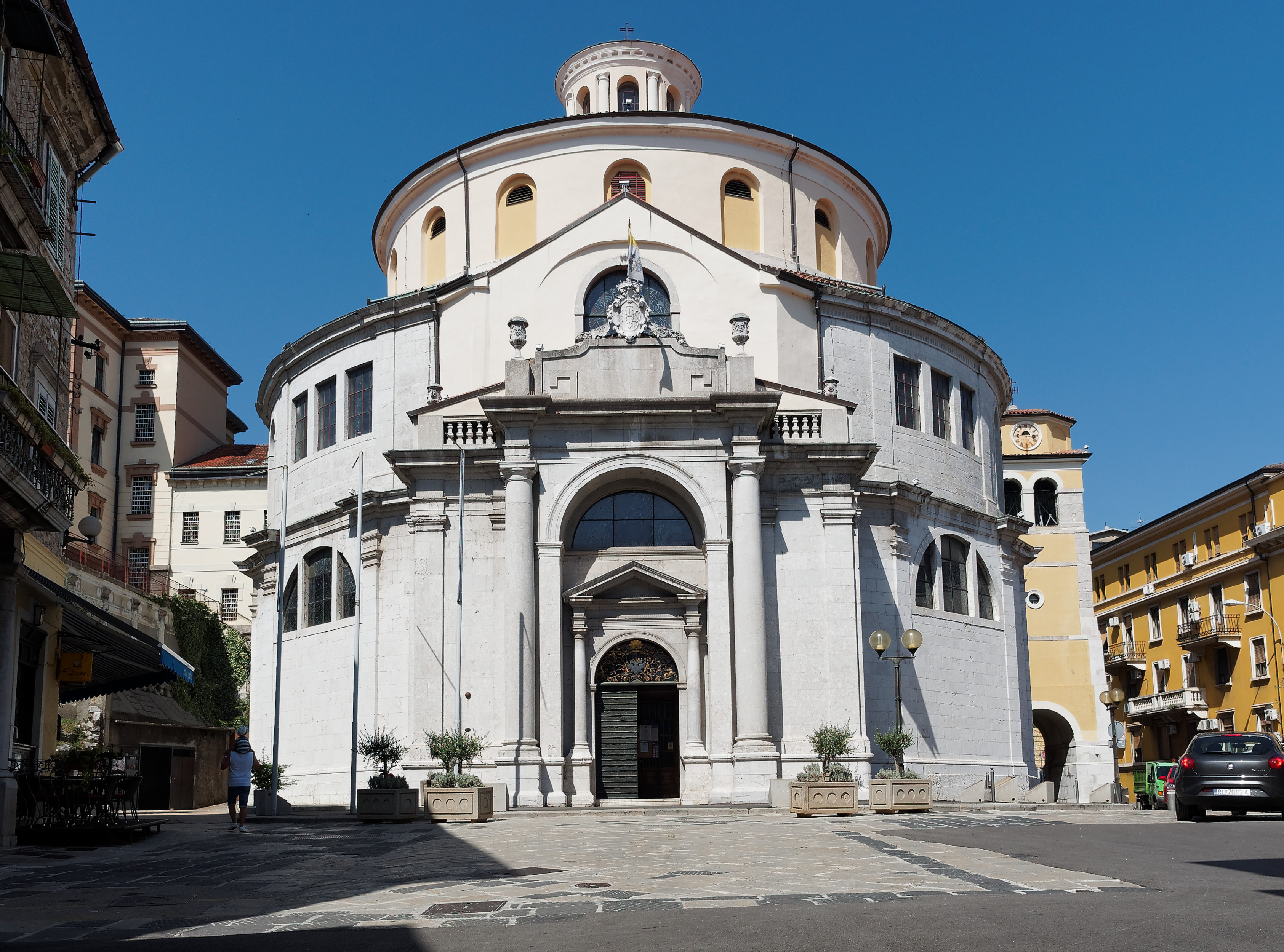 Fassade des Domes Sankt Vitus in Rijeka, Kroatien